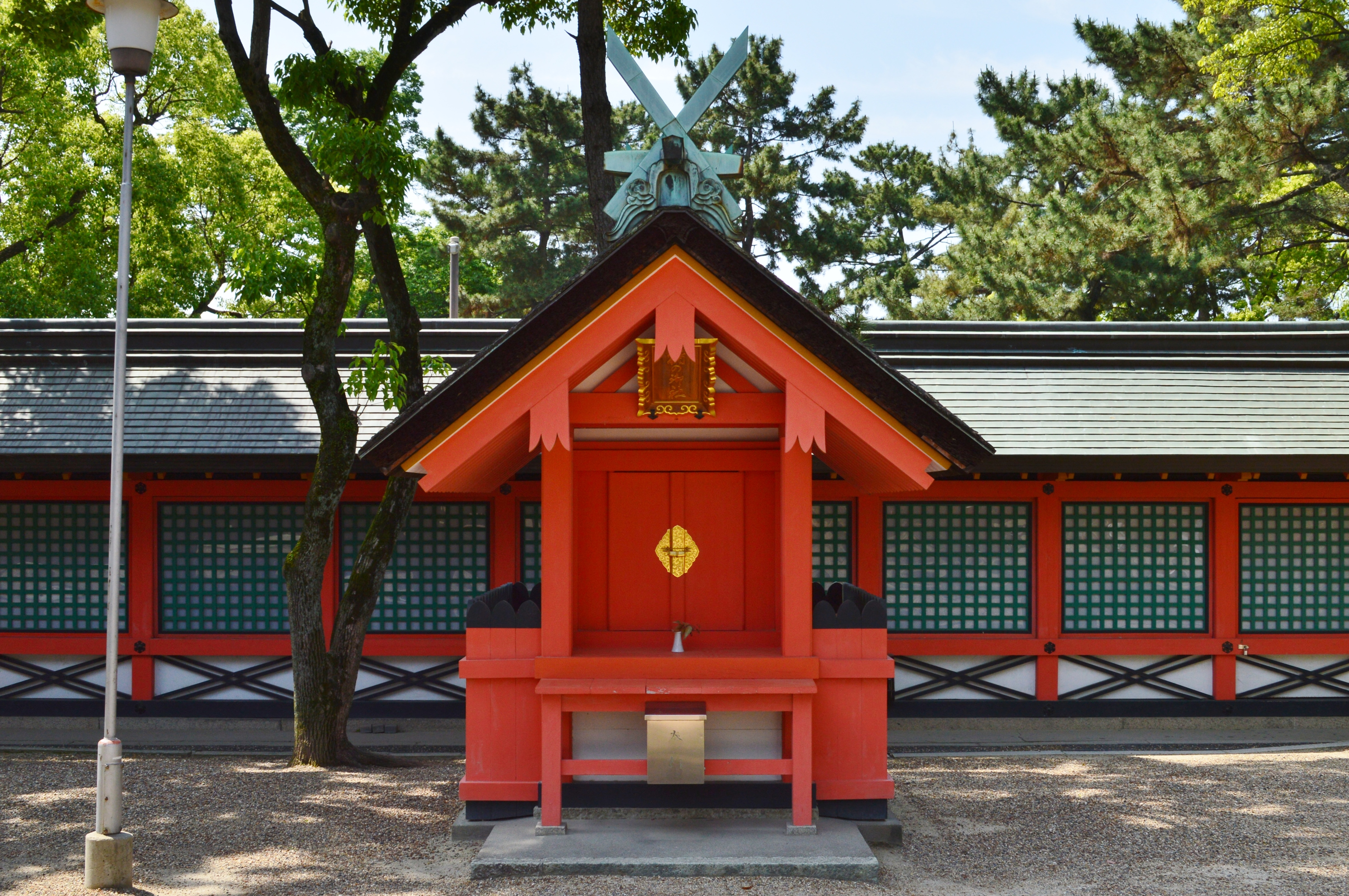 住吉大社境内末社 楯社